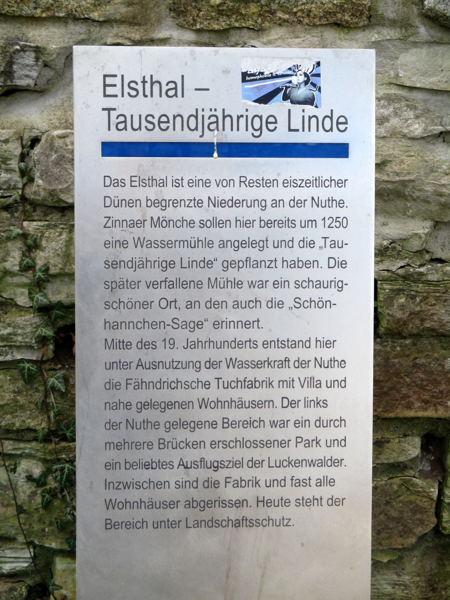 Luckenwalde in Brandenburg. Die Tausendjährige Linde ist ein eingetragenes Naturdenkmal.